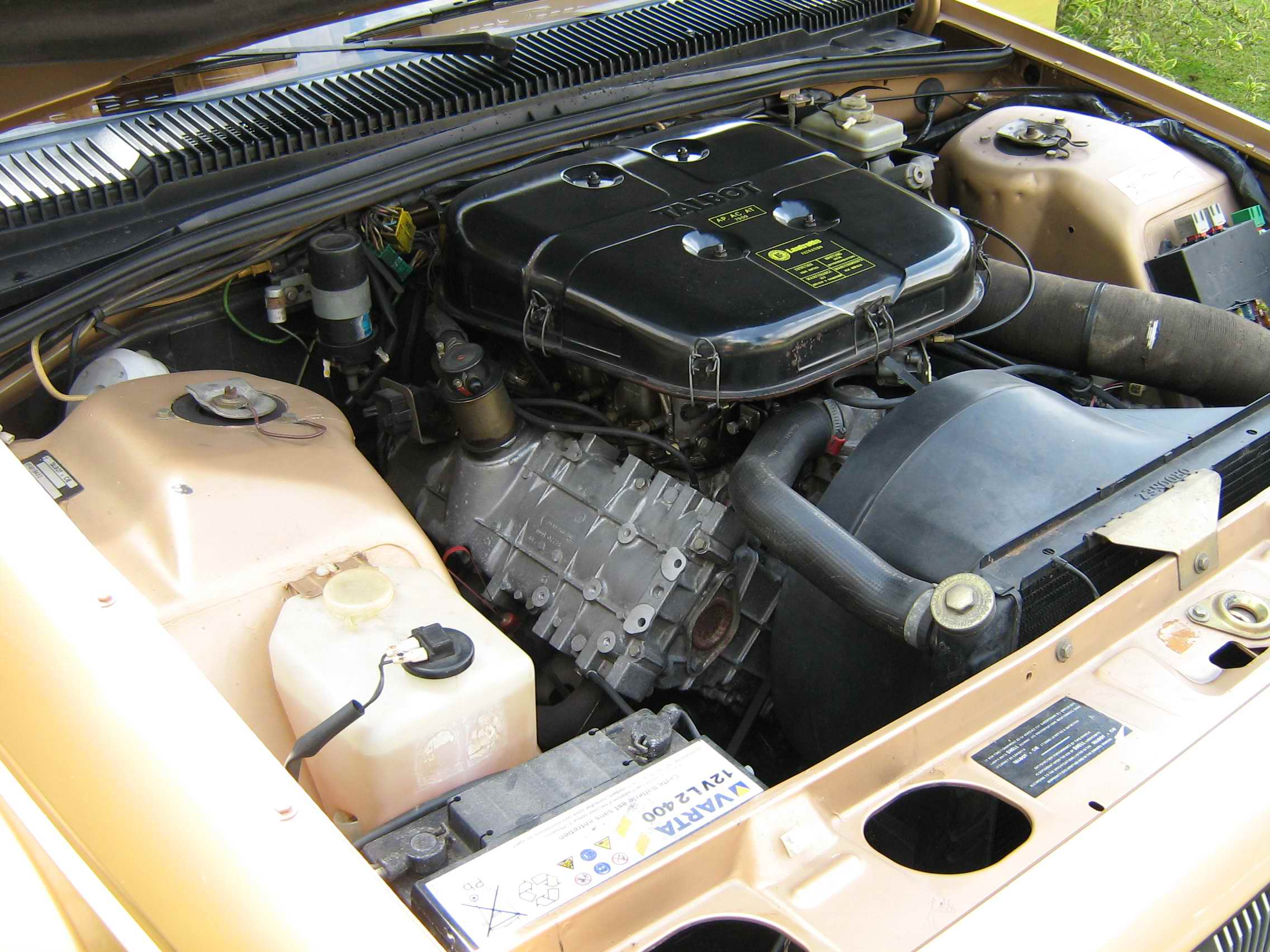 1982 Talbot Tagora SX, 2.6 litre V6.